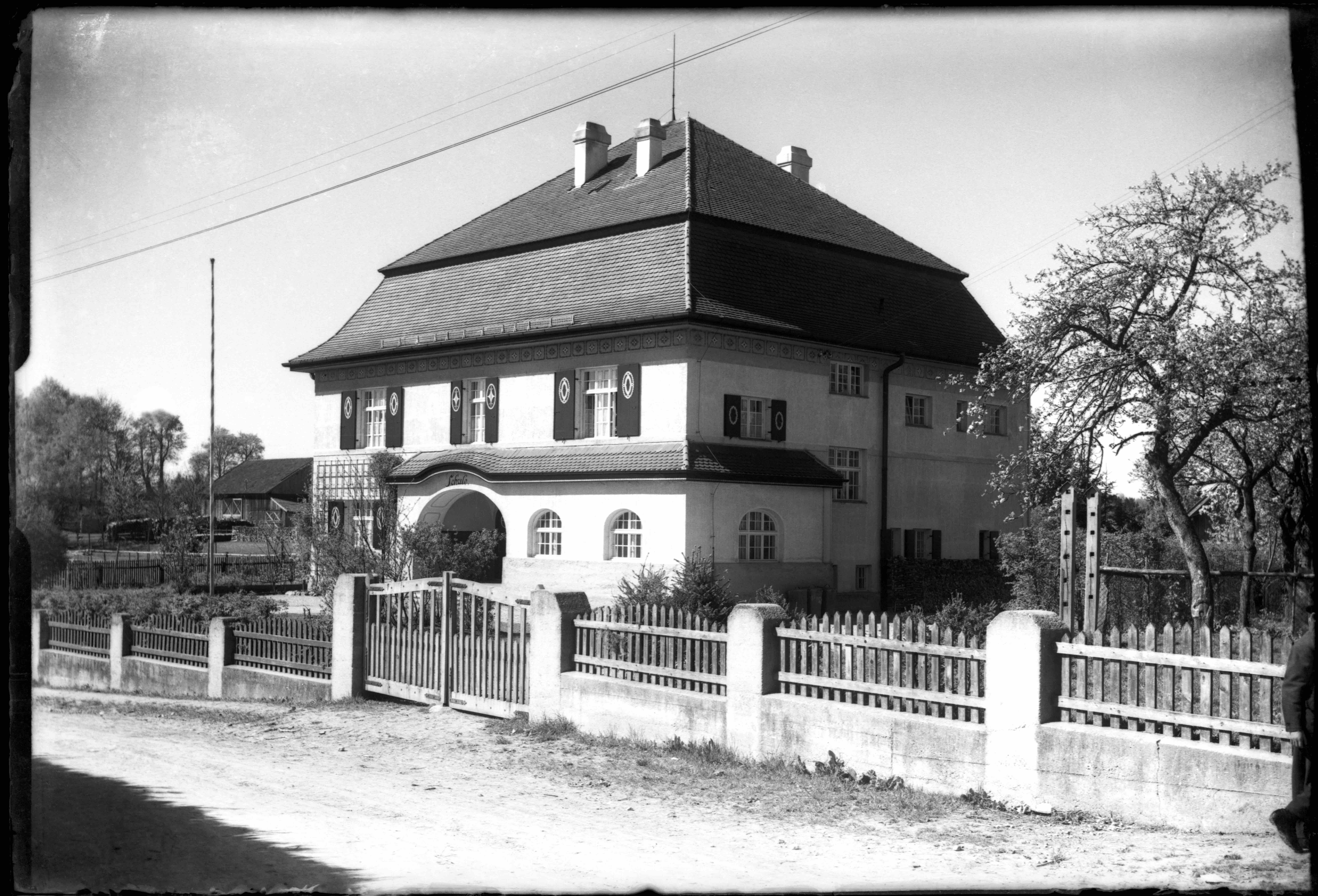 Rathaus in Pöcking, ehemals Schulhaus 1912